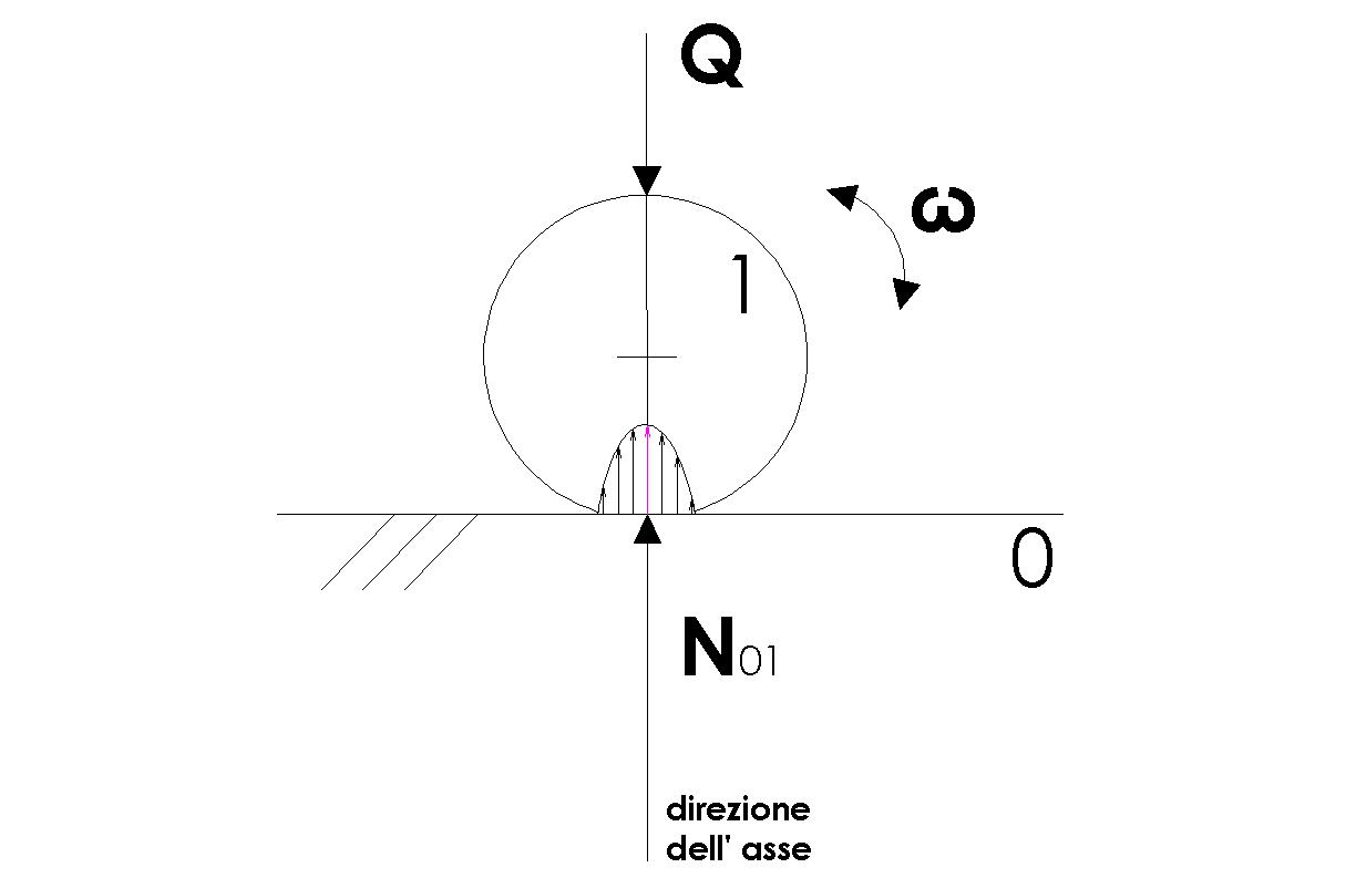 Fig. a). Diagramma delle pressioni nel puro rotolamento. 0 è il membro membro fisso. 1 è il membro che ruota senza strisciare. ω è la velocità di rotazione di 1. Q è la forza applicata sul membro mobile. N01 è la componenete normale della reazione vincolare di 0 su 1.